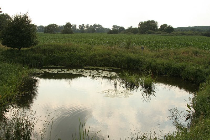 Chráněná rybí oblast v oblasti Hrbáčkovy tůně.